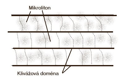 Jednoduchý a ilustrativní obrázek, snažící se vysvětlit co to je kliváž